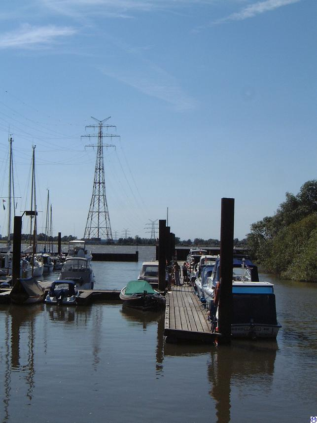 Strommast der Elbekreuzung 2 bei Hetlingen